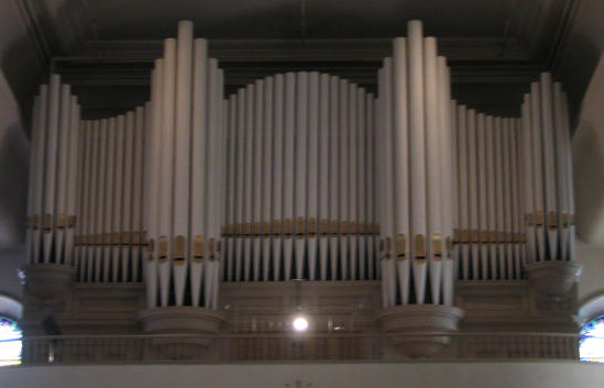 Orgue Casavant 1915. Église Notre-Dame-de-Grâce de Montréal. Source Photographie prise le 31 août 2007 par Utilisateur:Duruf